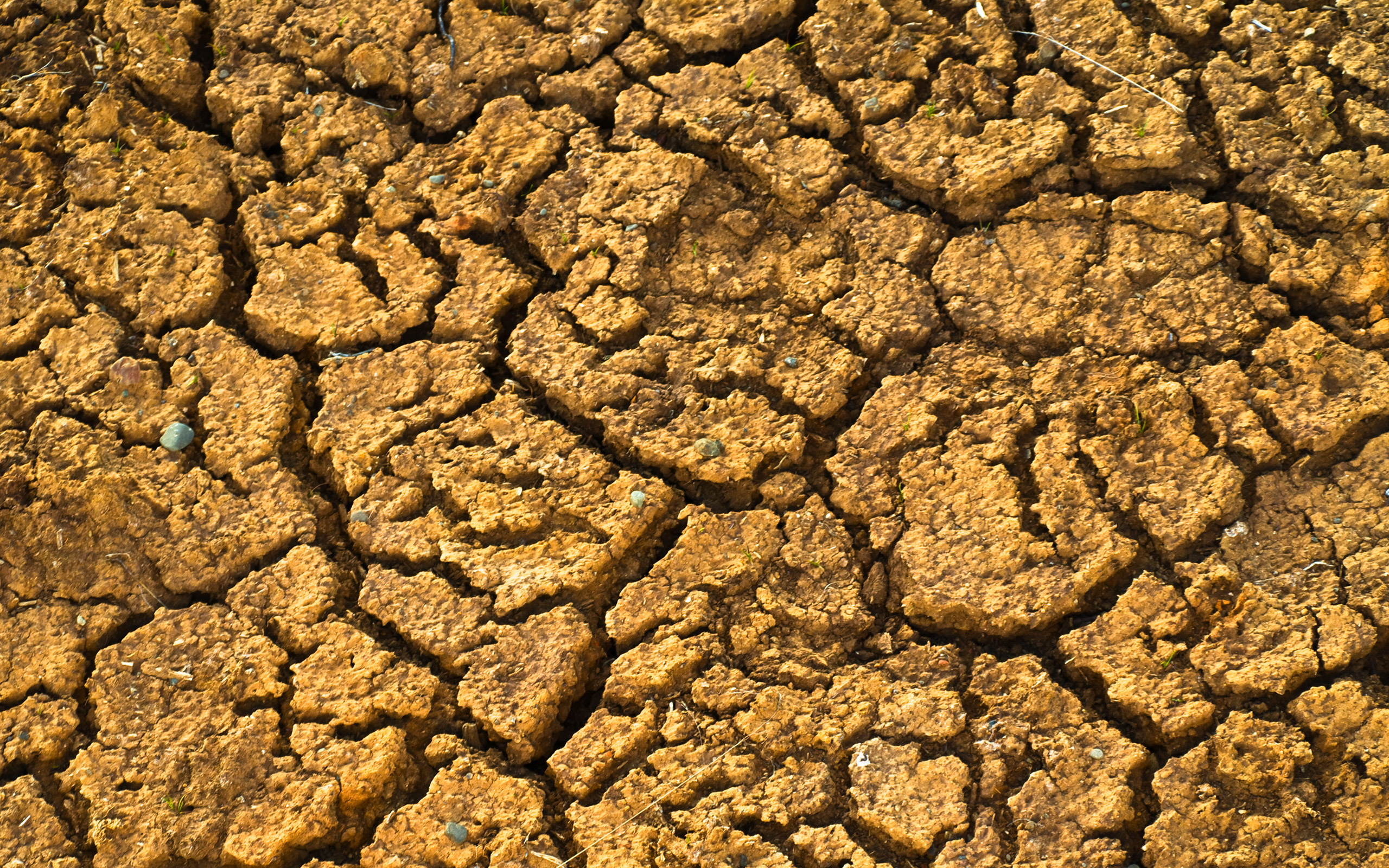 Craquelure